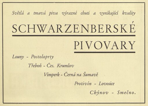 Schwarzenberské pivovary, inzerát 1936